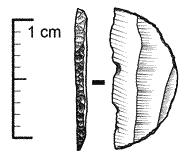 Microlito: segmento de círculo